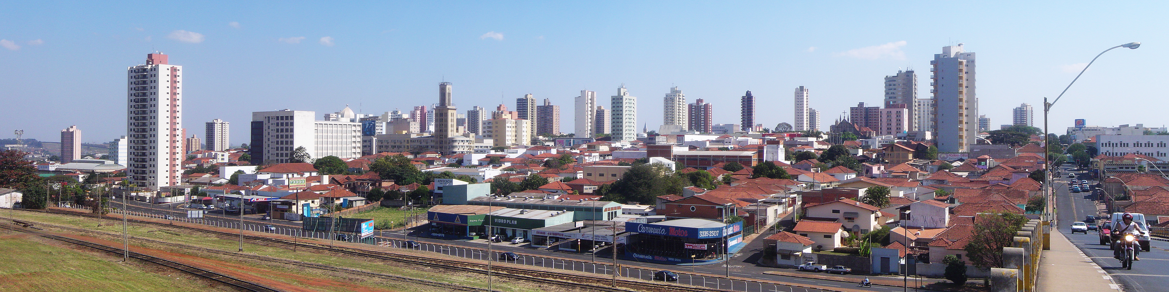 Vista Panorâmica Parcial de Araraquara